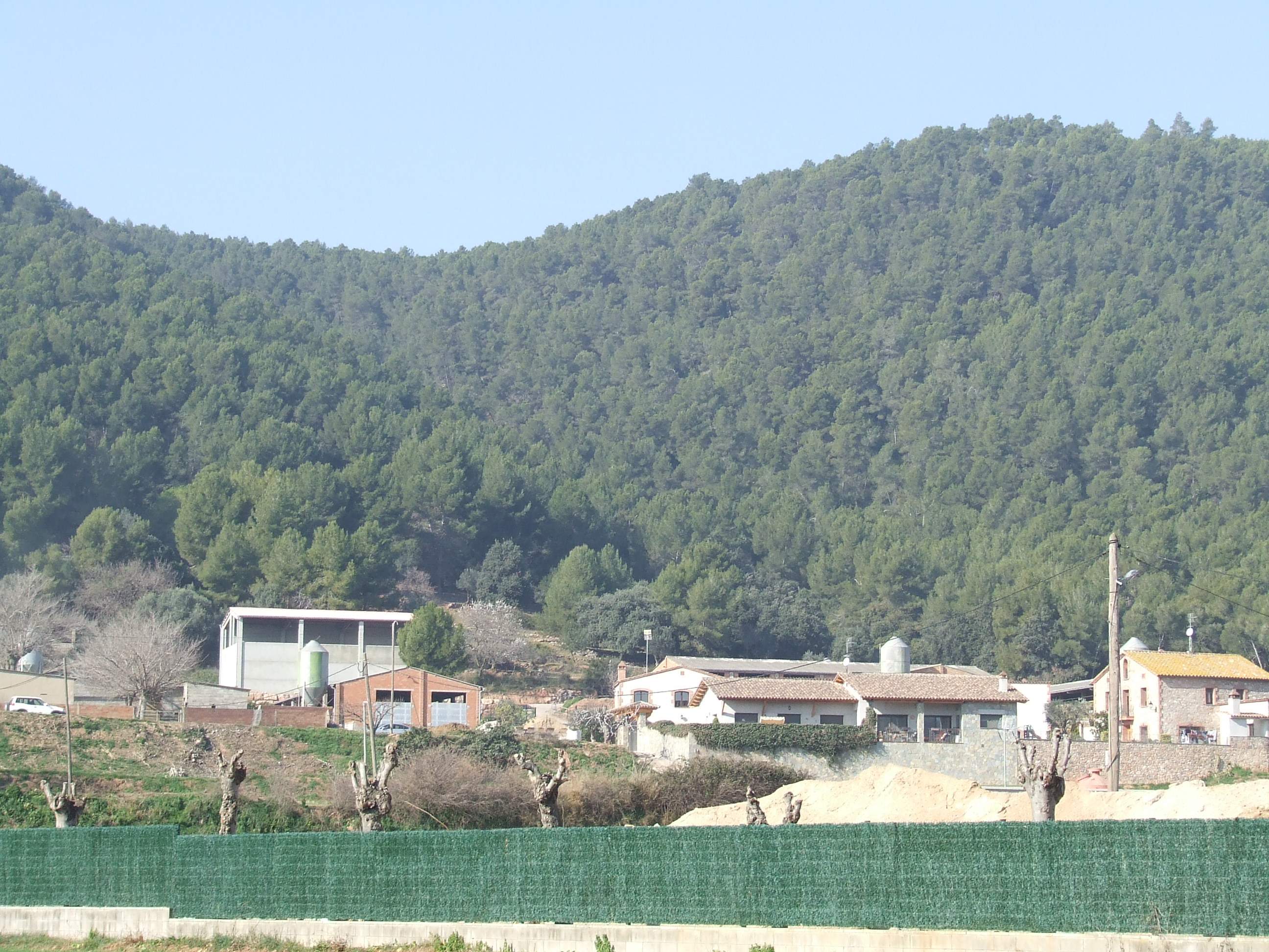 El torrent de Can Feliu (Bigues, Bigues i Riells, Vallès Oriental)